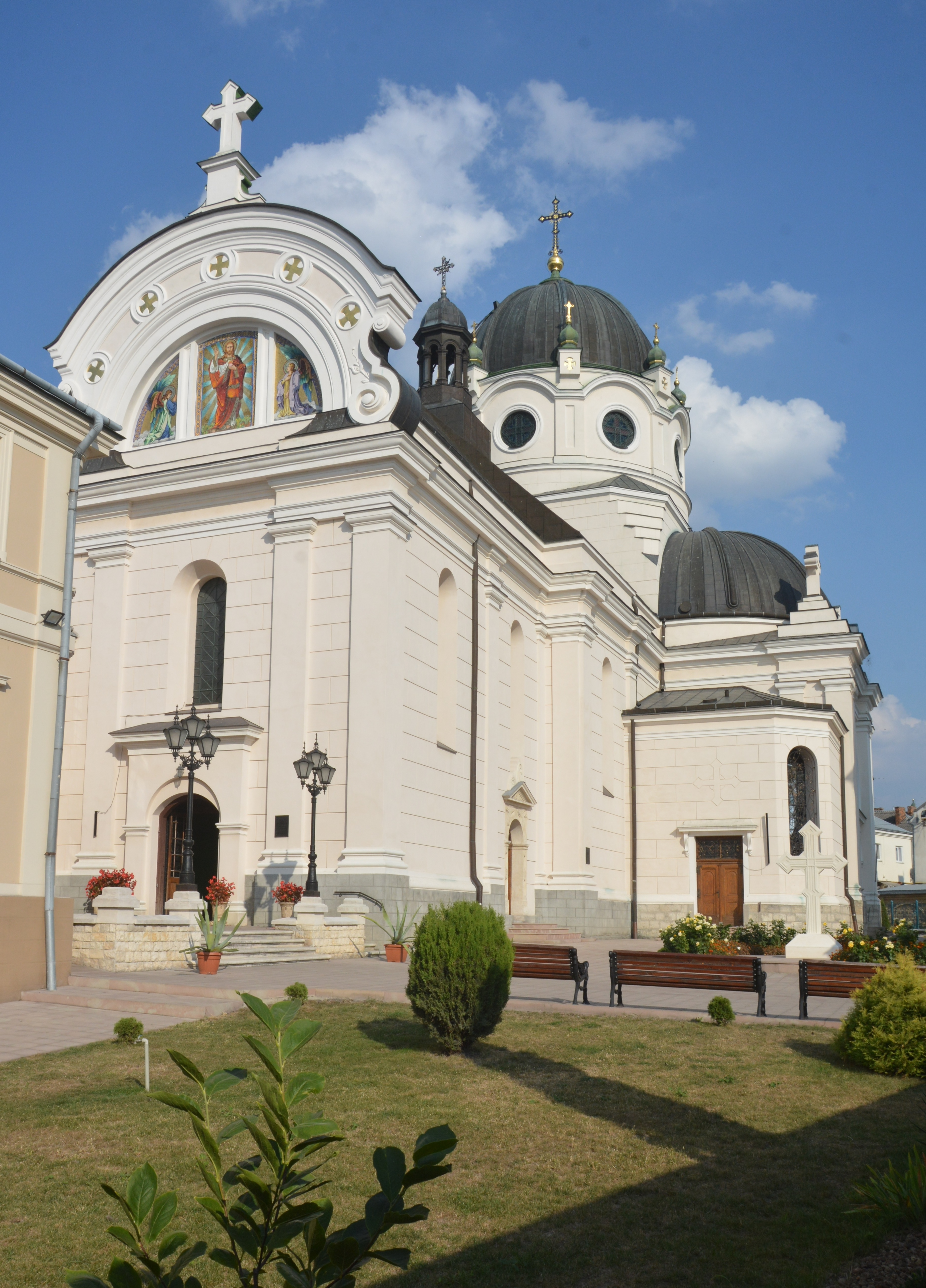 Церква Св.Параскеви (Св.Трійці) (мур.), Жовква, вул.Василіянська